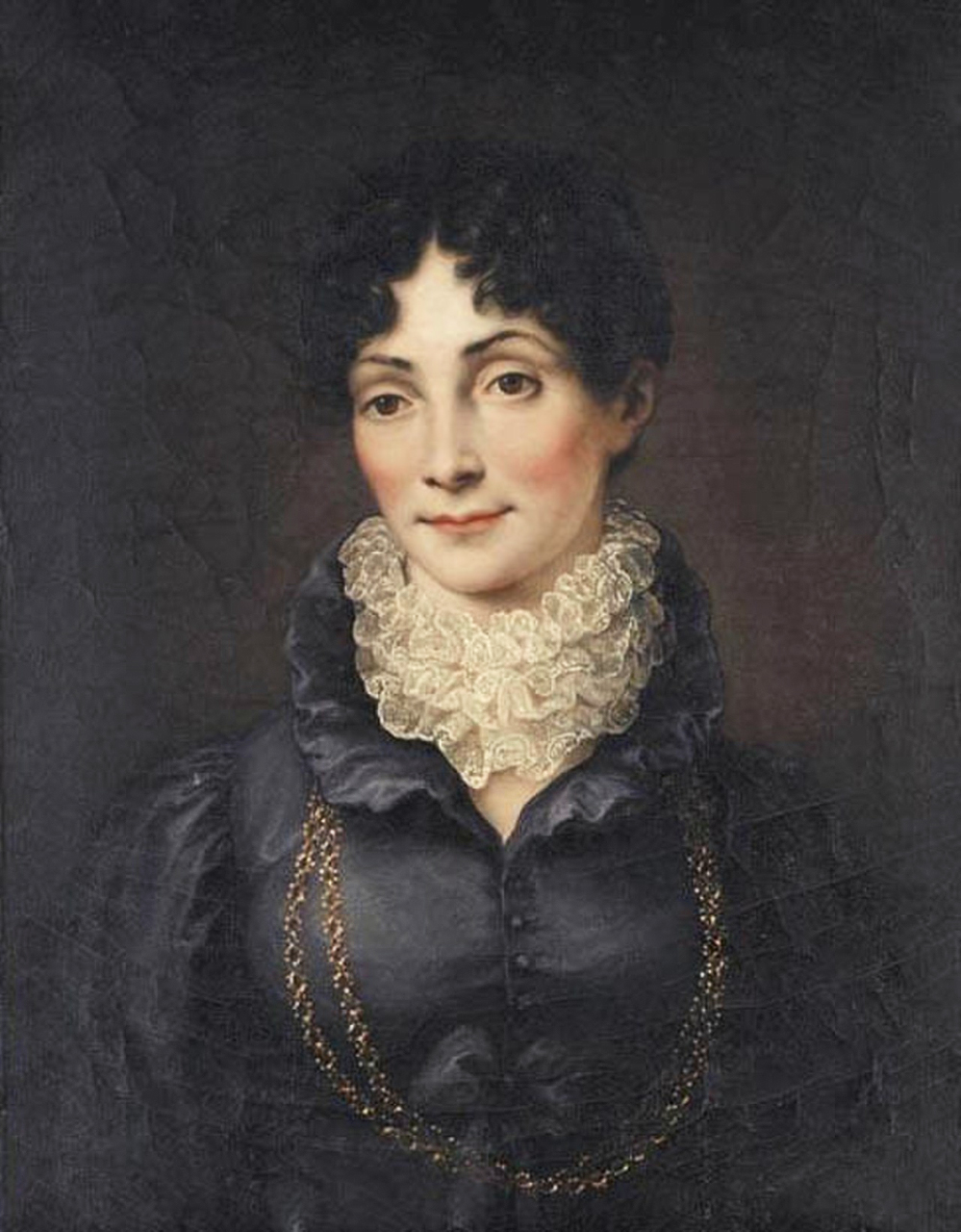 Herzogin Charlotte von Sachsen-Hildburghausen (1764-1818)